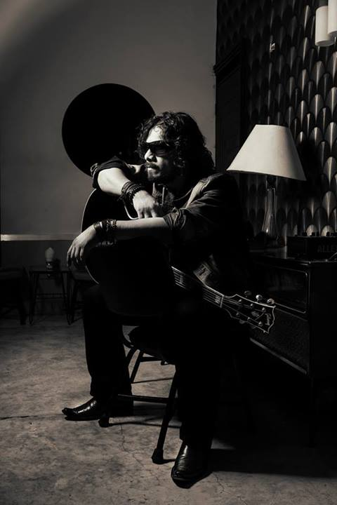 Músico mexicano - Cantante de Rock independiente